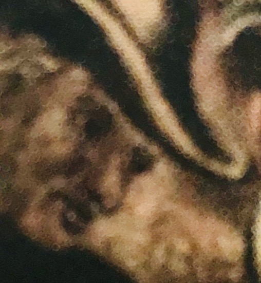 Mutmaßliches Selbstportrait von Innozenz Anton Warathy im Deckengemälde der Schutzengelkirche Burghausen von 1731